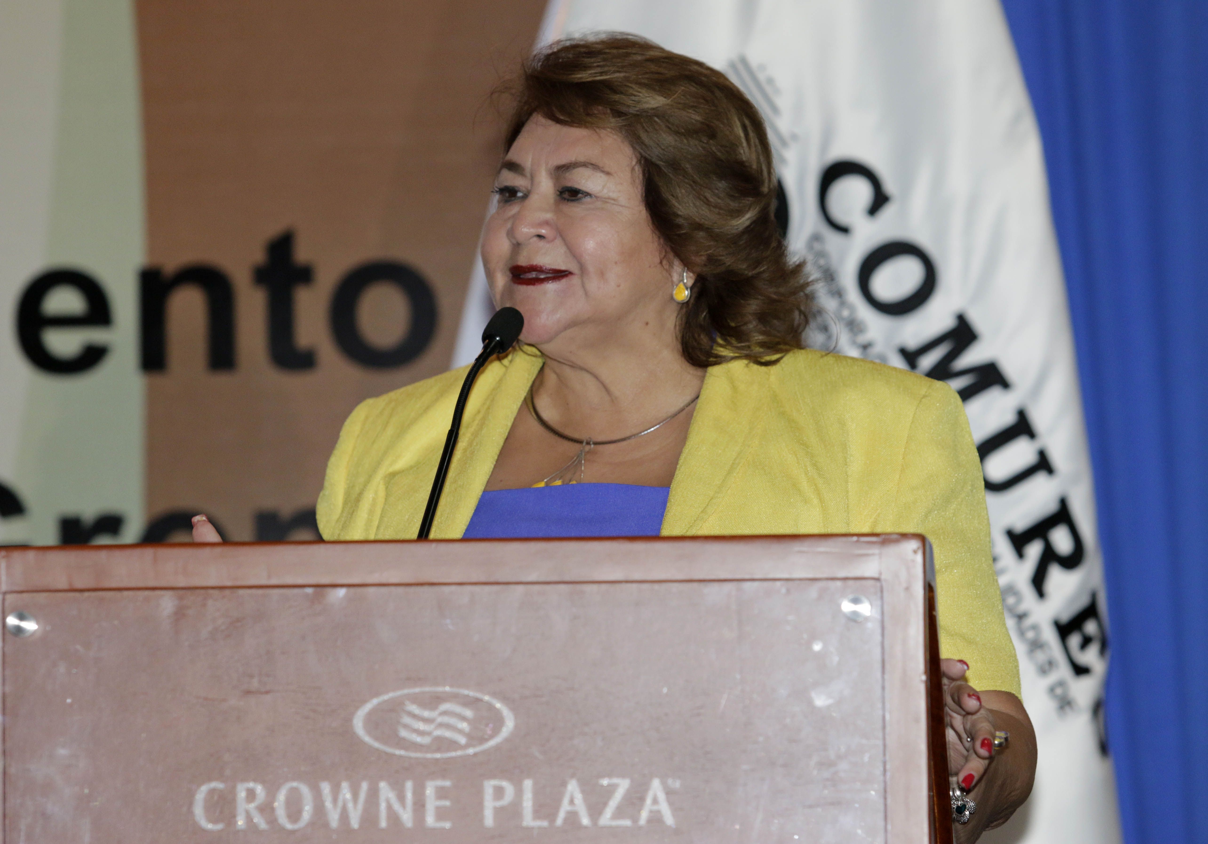 La alcaldesa de Antiguo Cuscatlán en el 31.º Congreso Nacional de Municipalidades.